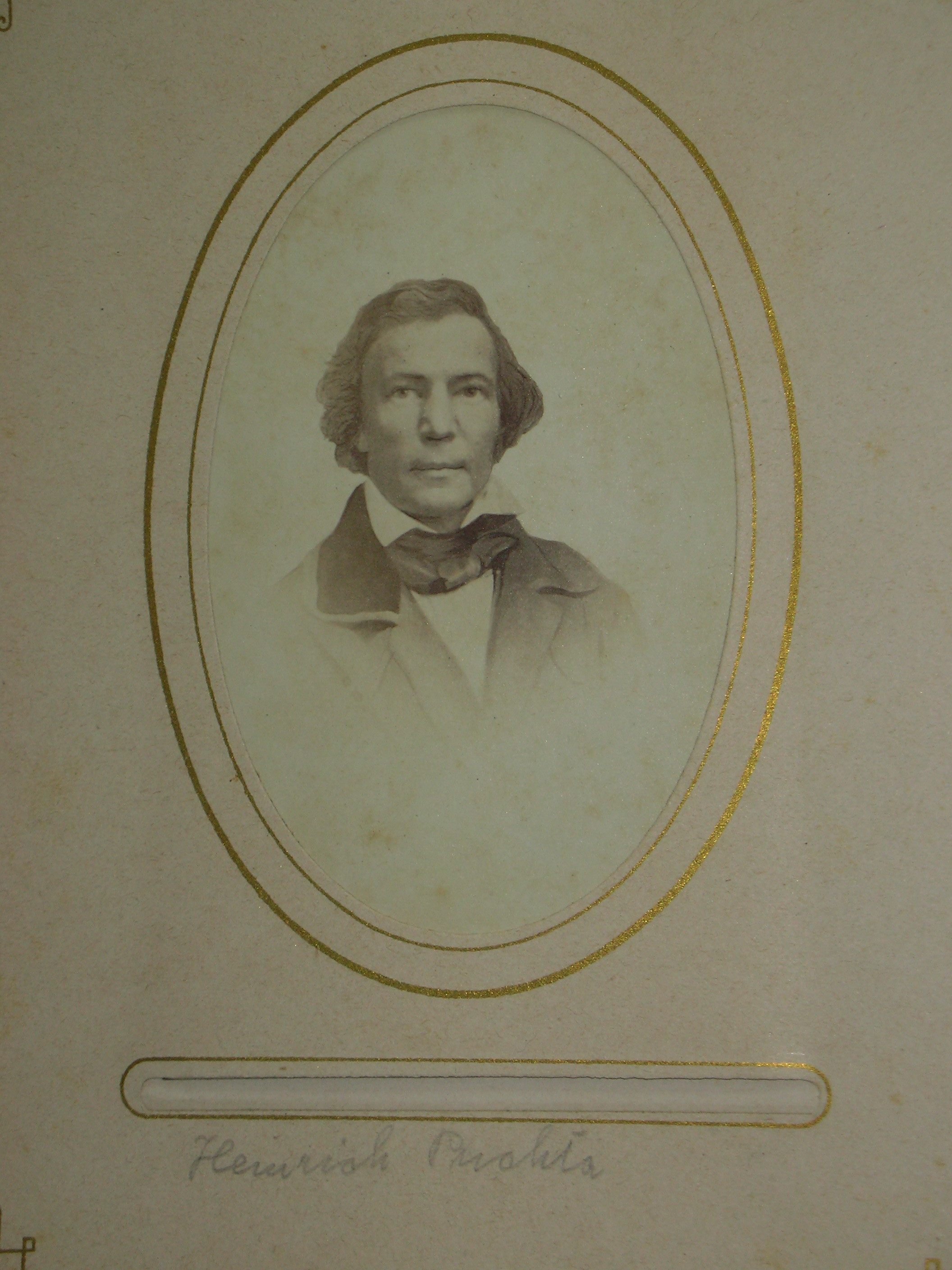 Das Bild stellt Heinrich Puchta dar.